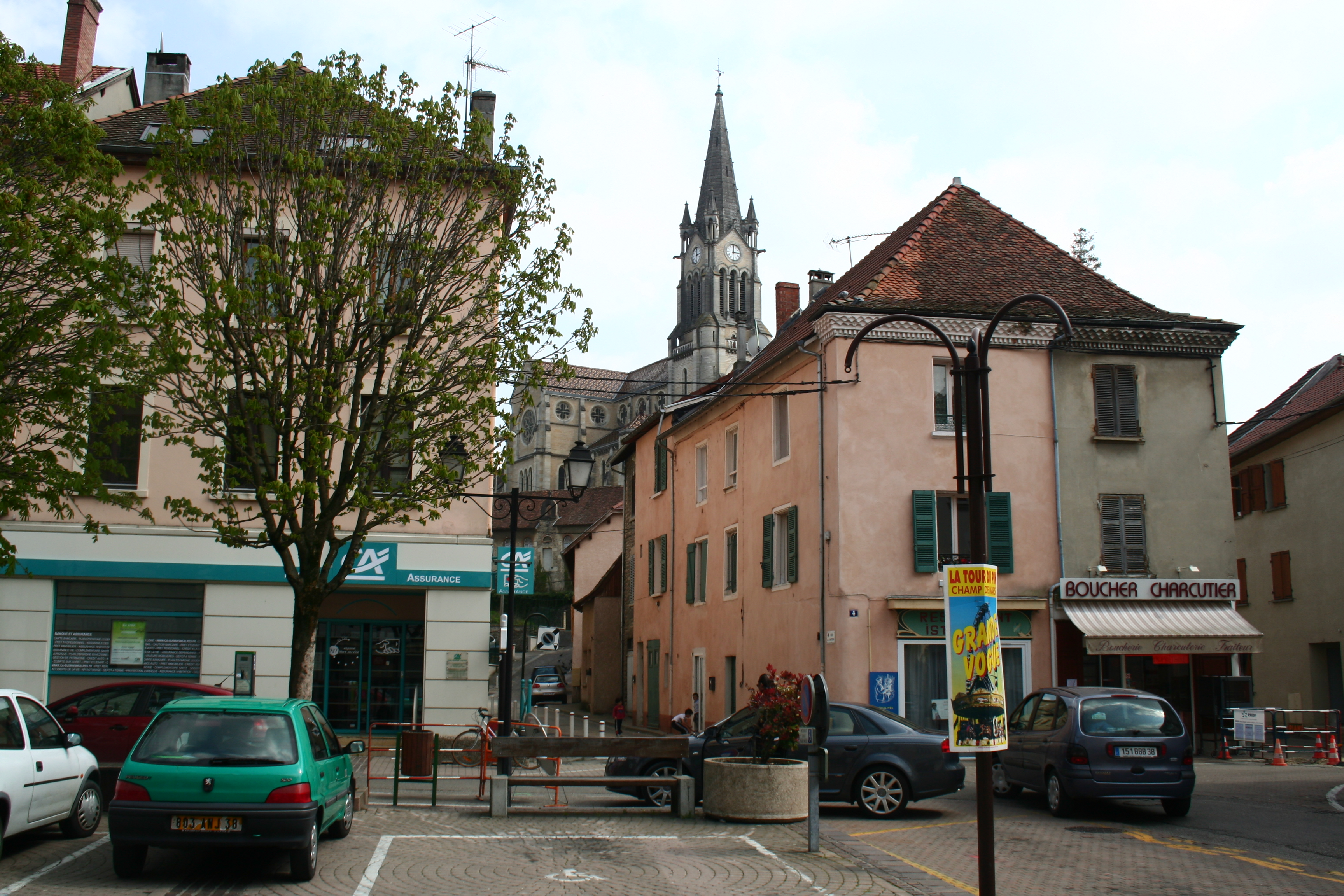 La Tour du Pin (38)